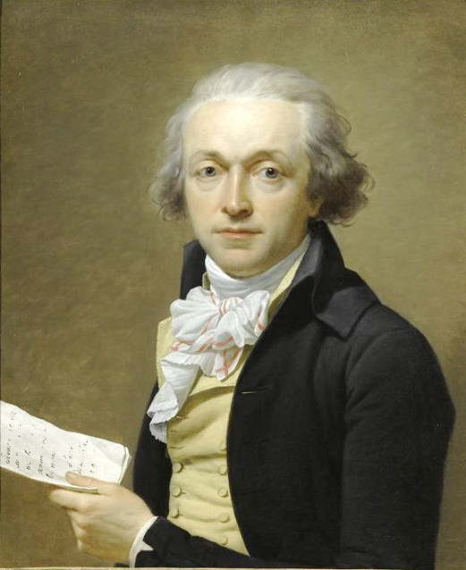 Joseph Delaunay (1746-1794)